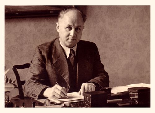 Willi Geldmacher (undatiert)